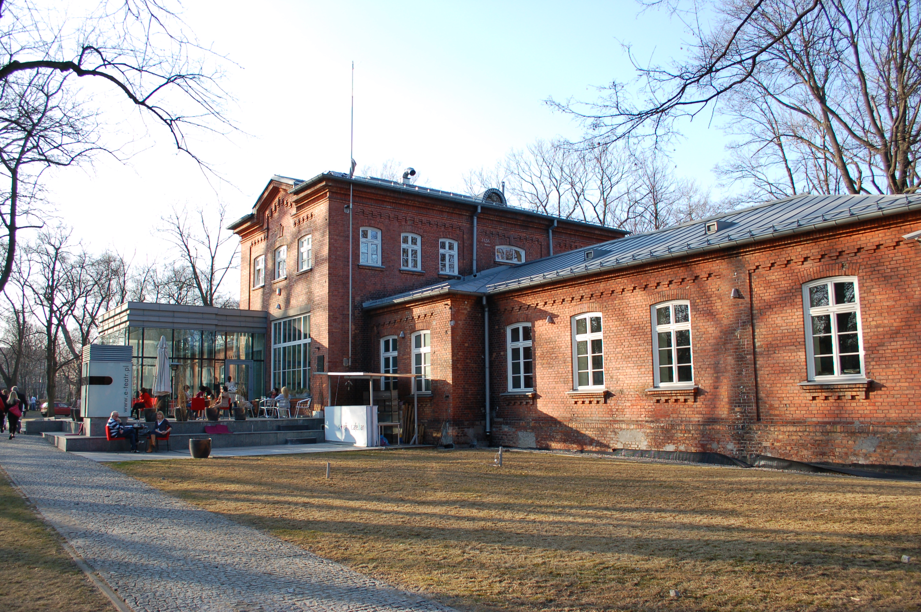 Instytut Teatralny im. Zbigniewa Raszewskiego/Główna Biblioteka Lekarska im. Stanisława Konopki , ul Jazdów 1, Warsaw